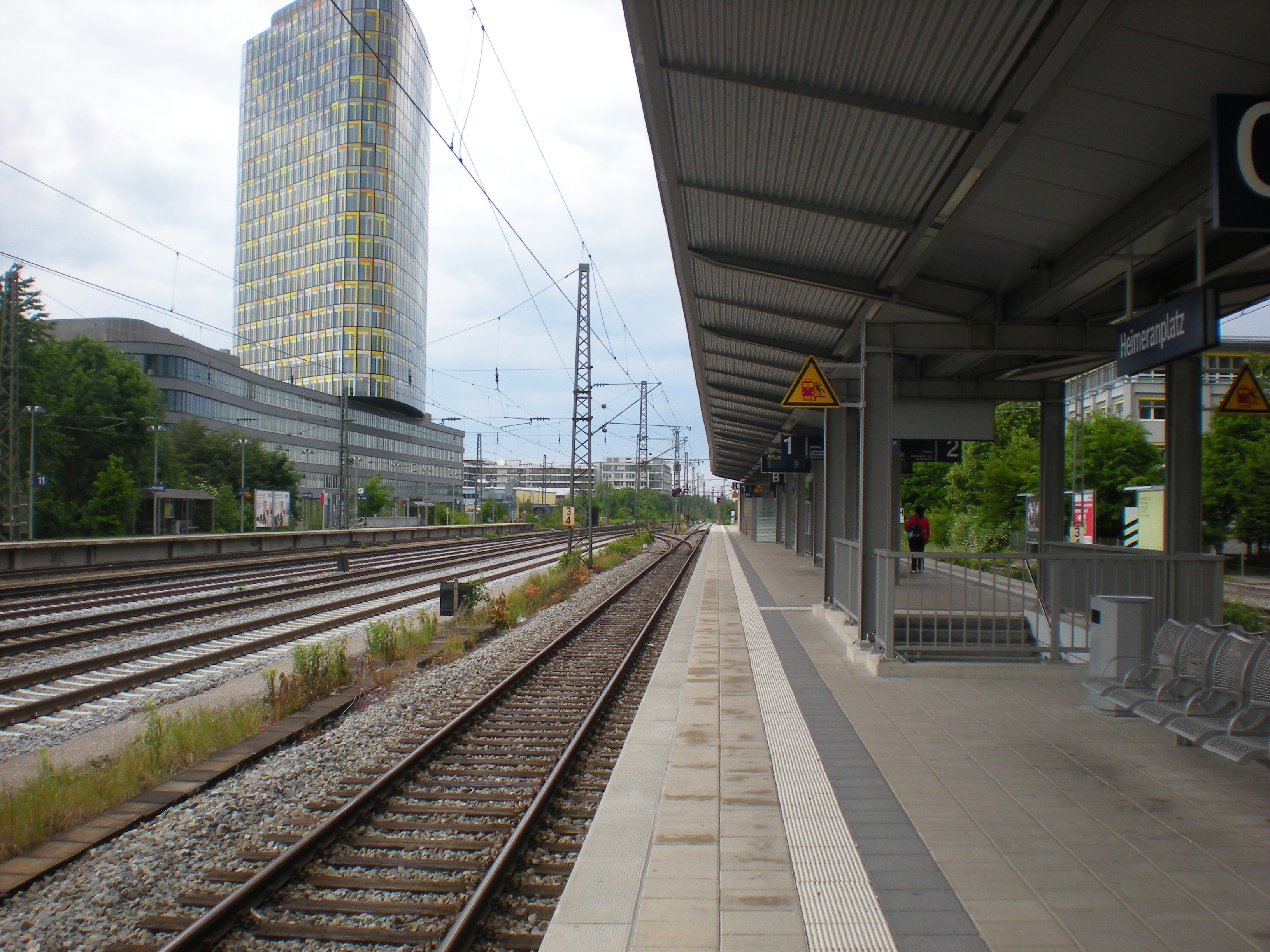 Bahnhof München-Heimeranplatz, von links nach rechts: Bahnsteig und Gleis der S20, zwei Gleise der Güterstrecke München Süd–Laim Rbf, zwei Gleise des Münchner Südrings, Bahnsteig mit zwei Gleisen der S7, ehemaligen S27 und BOB